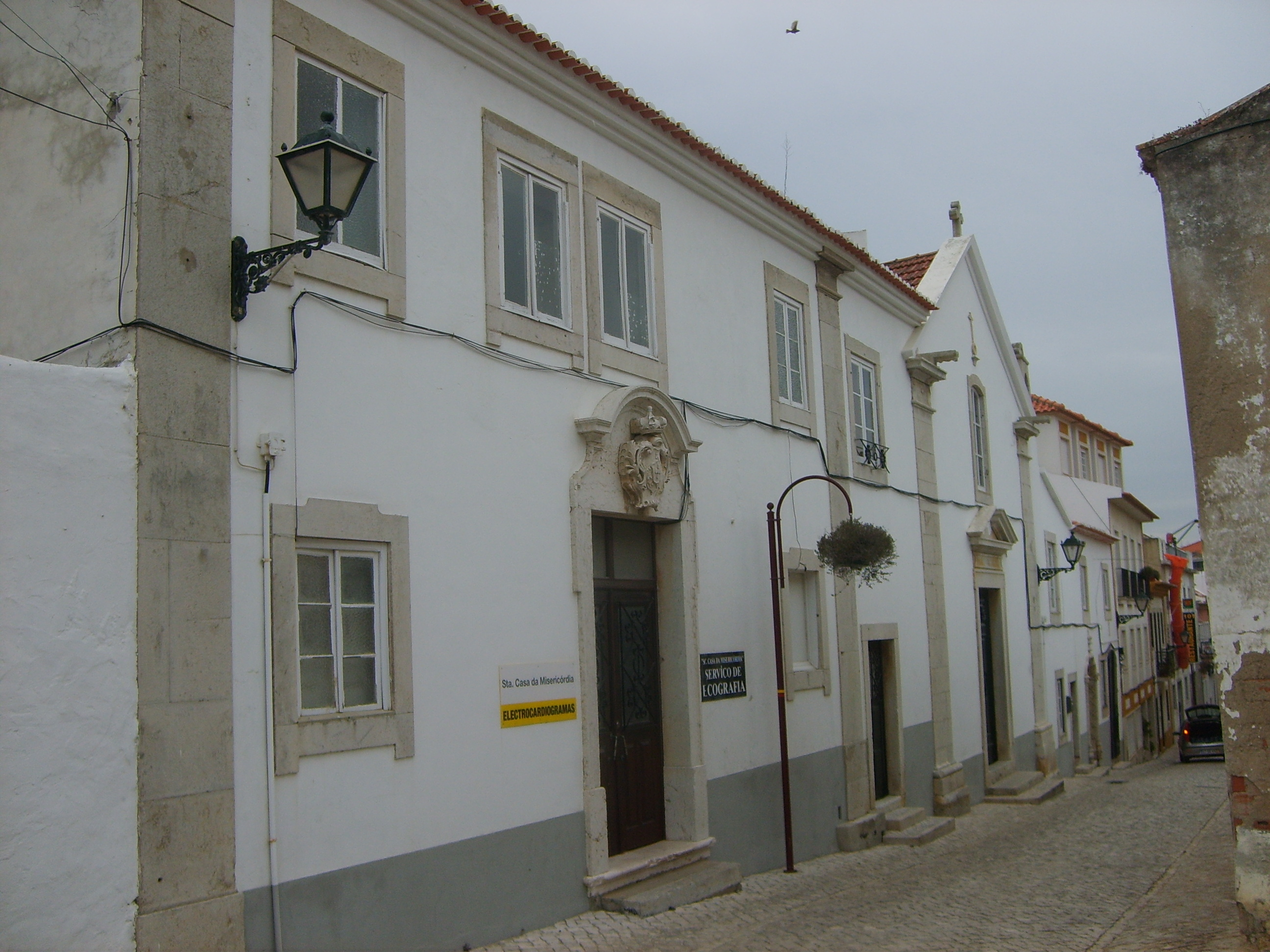 Lourinhã